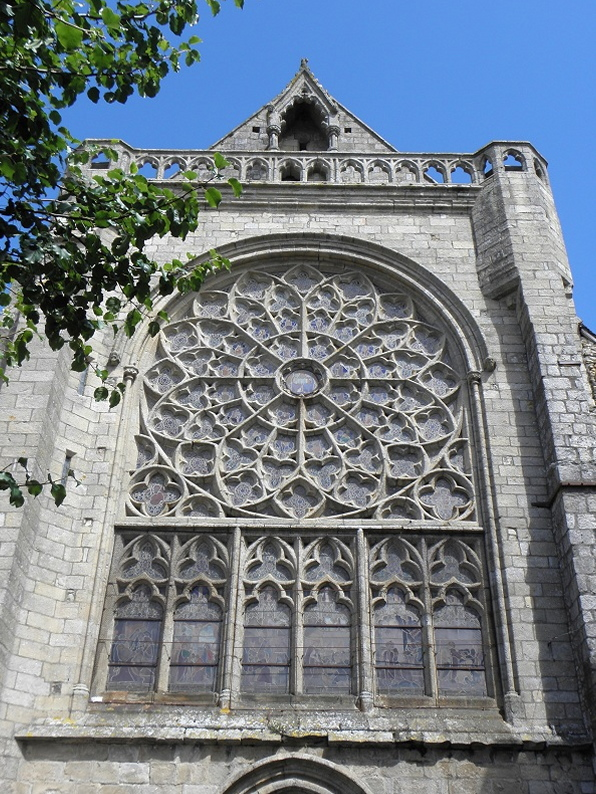 Maîtresse vitre de la façade méridionale du transept sud de la cathédrale Saint-Pol-Aurélien en Saint-Pol-de-Léon (29). .